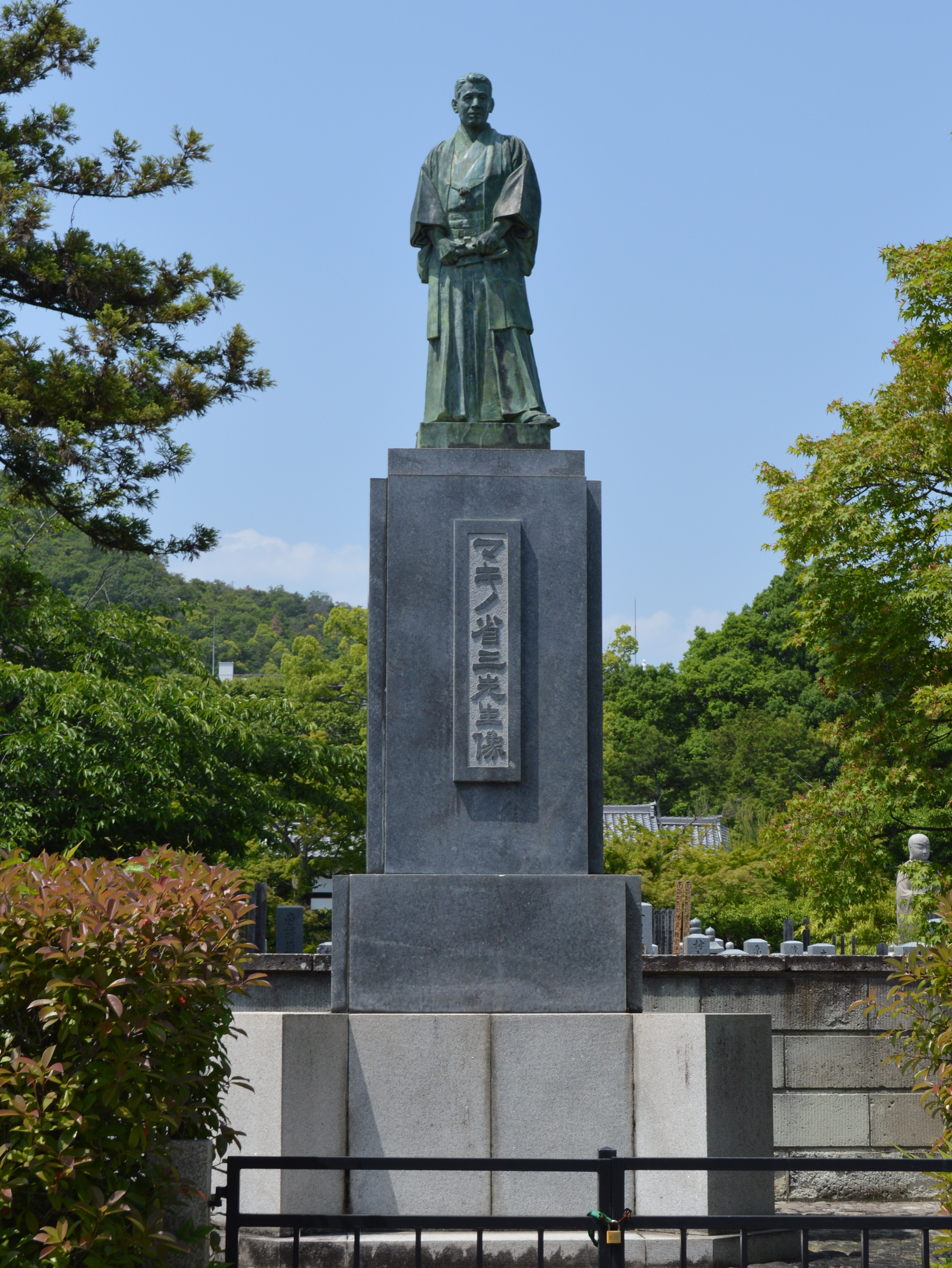 京都市北区等持院 等持院 境内にある「マキノ省三先生像」 後ろは境内墓地、左手奥は衣笠山